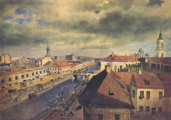 Акварель